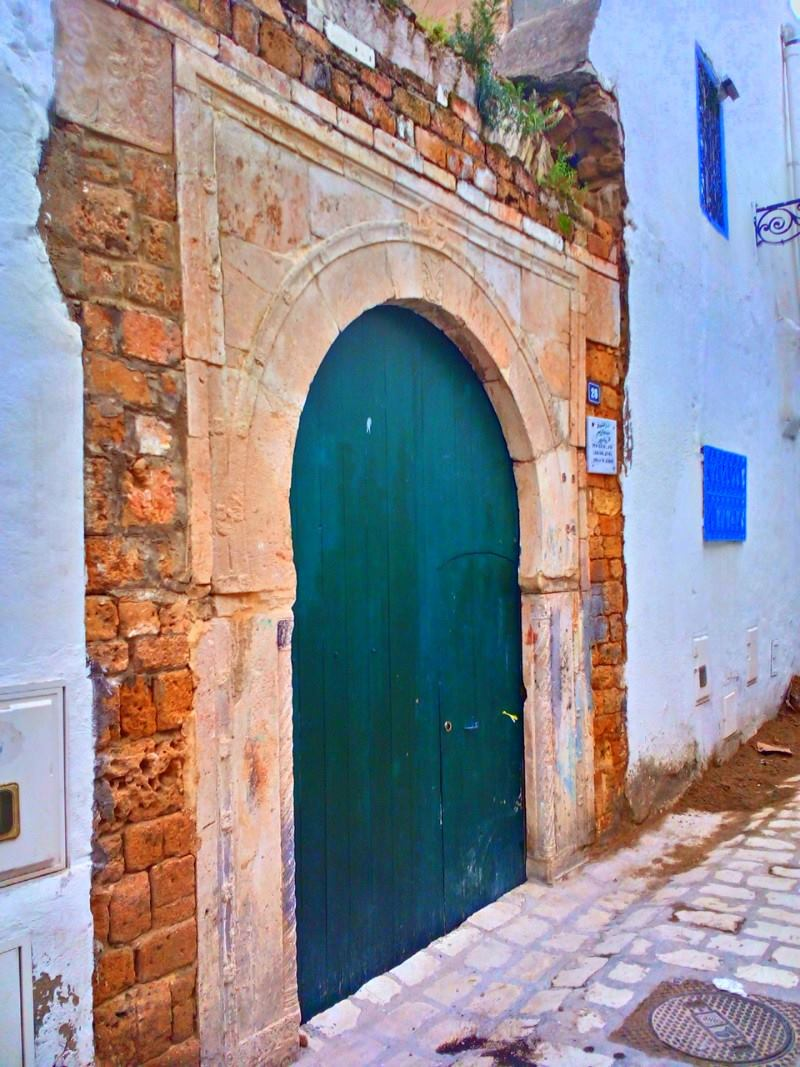 La médina de Tunis مدينة تونس العتيقة